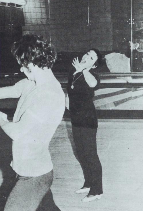 Teresa Kujawa podczas próby do spektaklu "Czar miłości", Teatr Wielki w Łodzi, 1976, fot. Chwalisław Zieliński